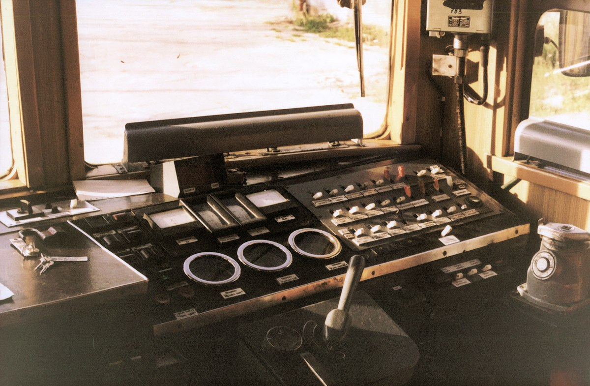 Kabina maszynisty elektrycznego zespołu trakcyjnego EN57-783.